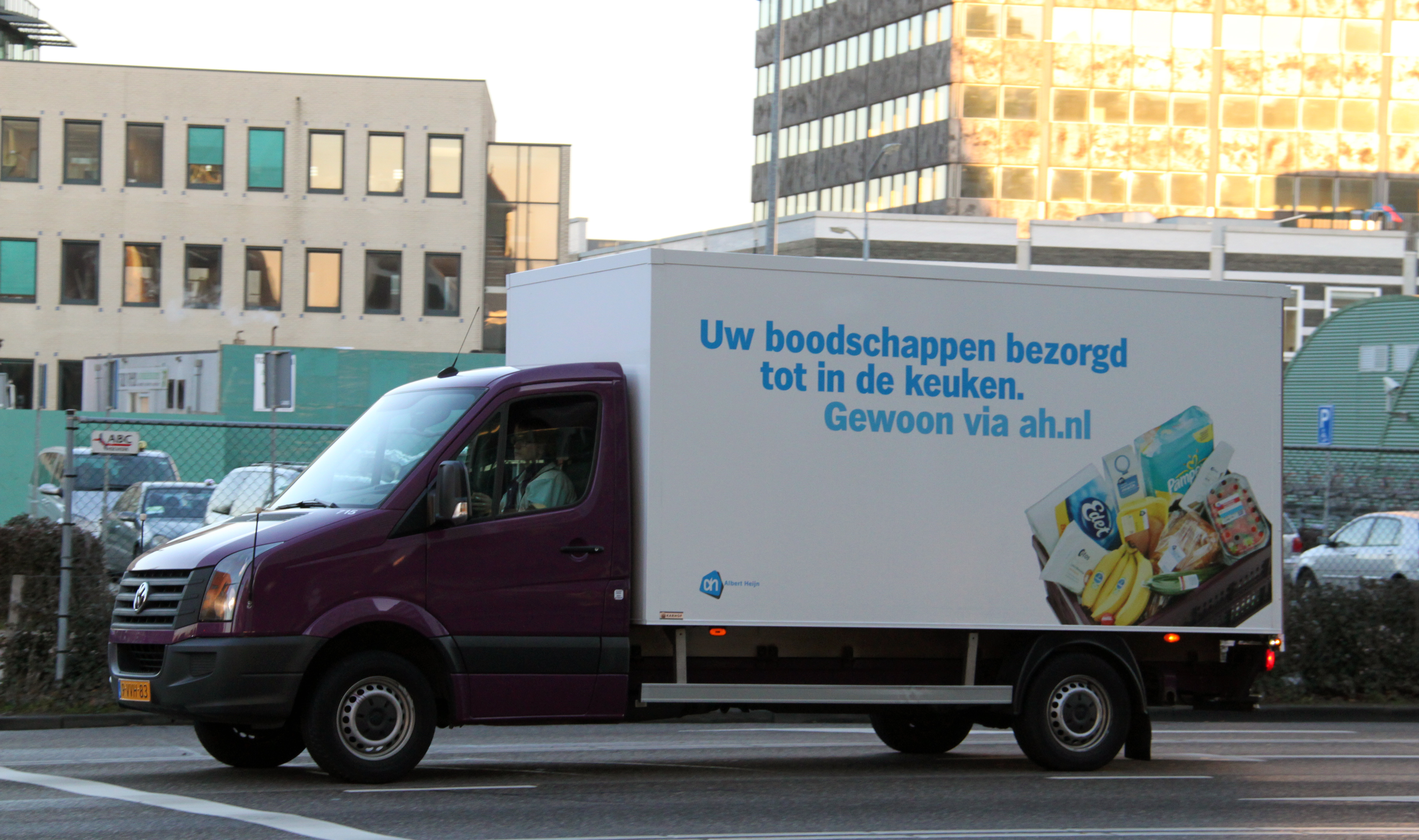 Een Volkswagen Crafter van Albert.nl in Zaandam.